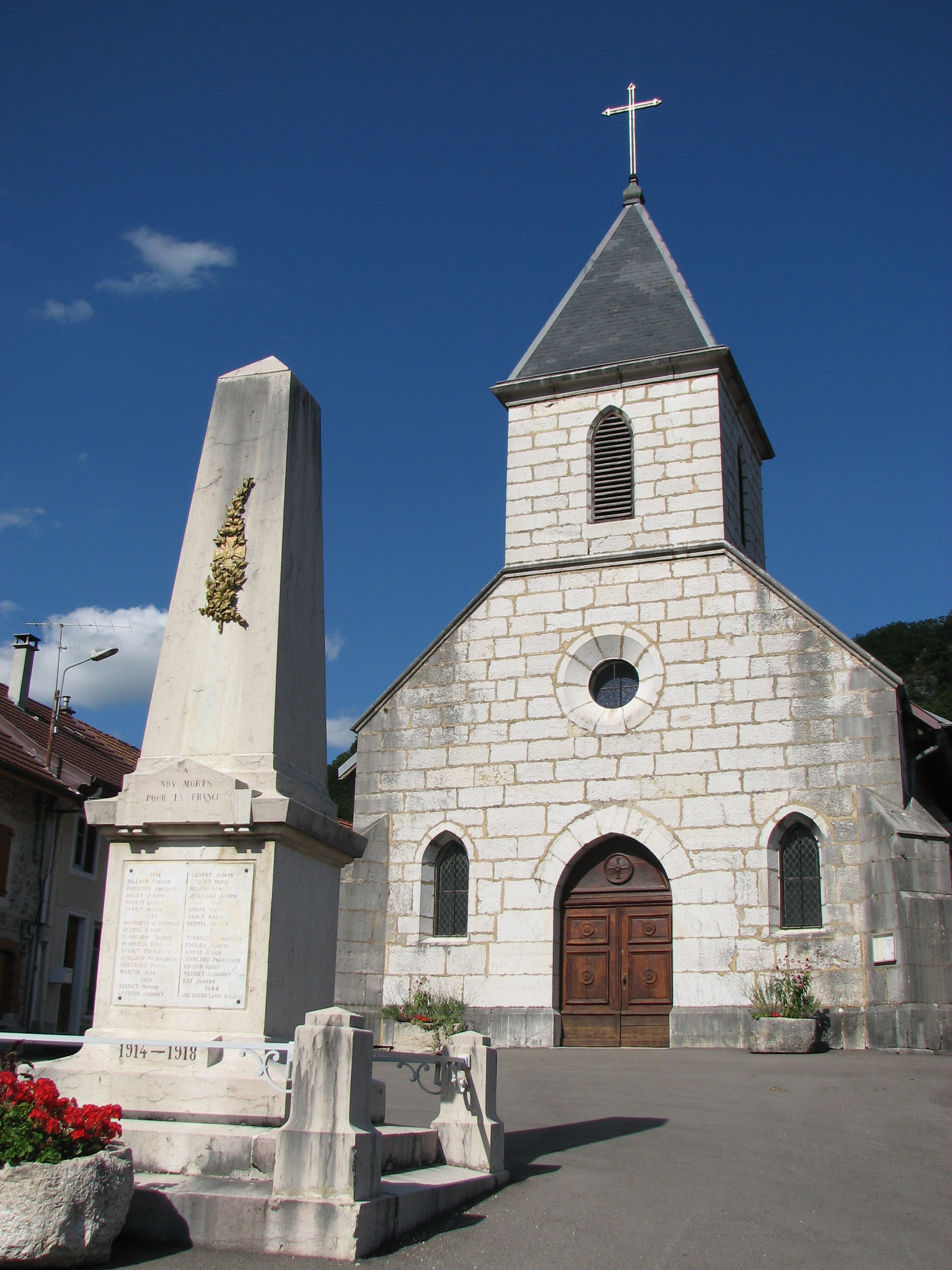 Place de l'église de Saint-Germain-les-Paroisses (Ain)